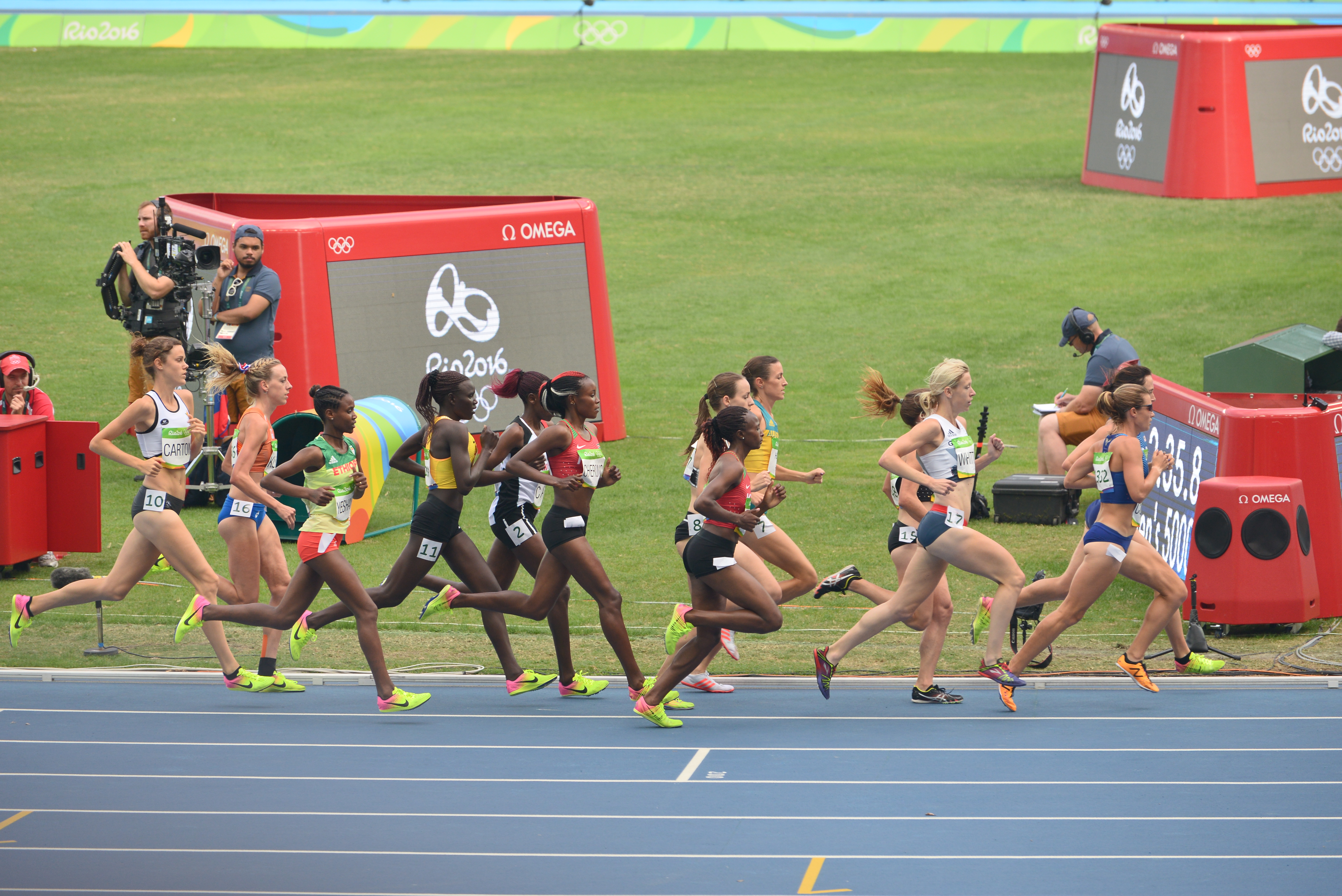 La 1er série du 5000m féminin à Rio 2016